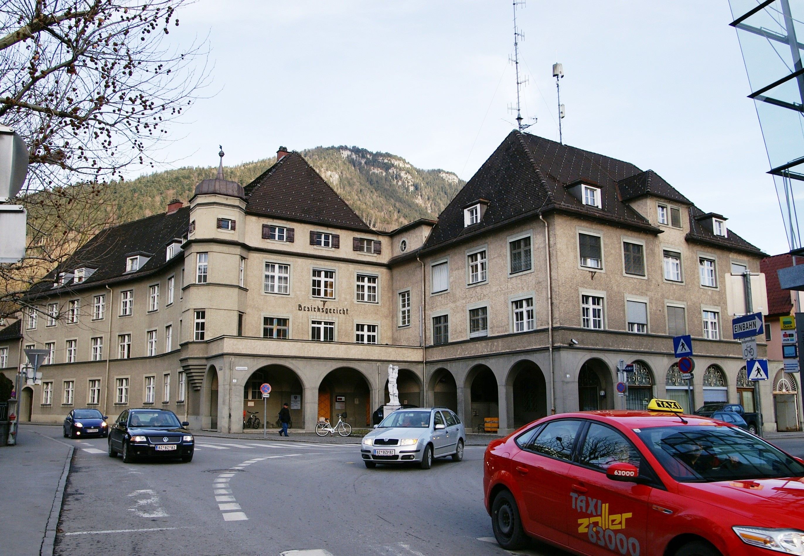 aus dem DEHIO Vorarlberg 1983: Sparkassenplatz Nr.2,4 Bezirksgericht, Gendarmeriebezirks- und Postenkommando (ehemals Bezirkshauptmannschaft), erbaut von Willibald Braun, 1927-1929. Heimatstilbau mit Arkadeneingang, Eckerker. *** in Bludenz.